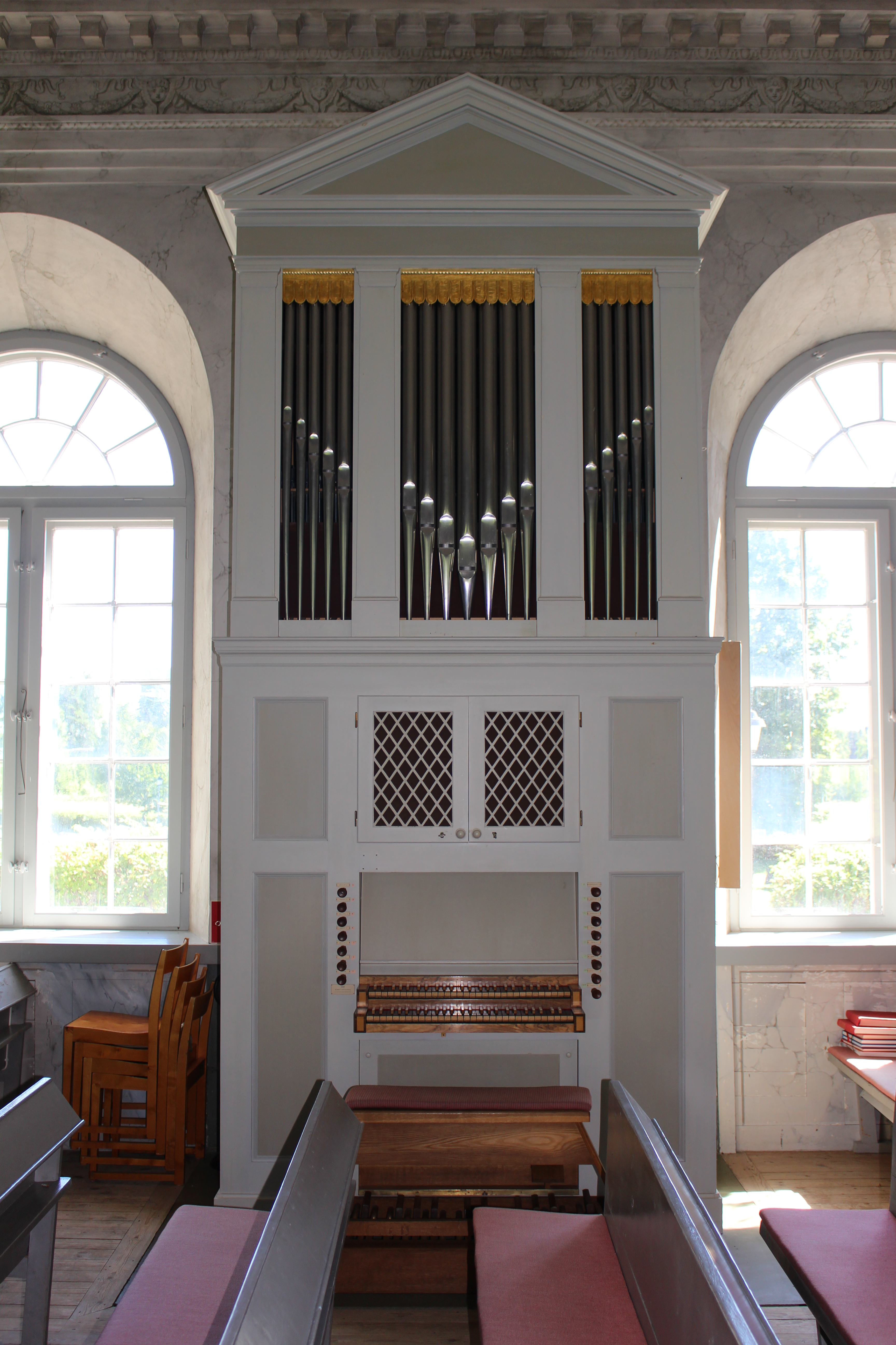 Orgel i Forsmarks kyrka.